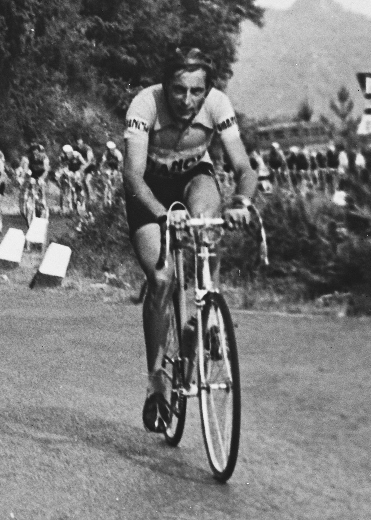 Ronde van Italie. 6e Etappe Kobled en Cappi